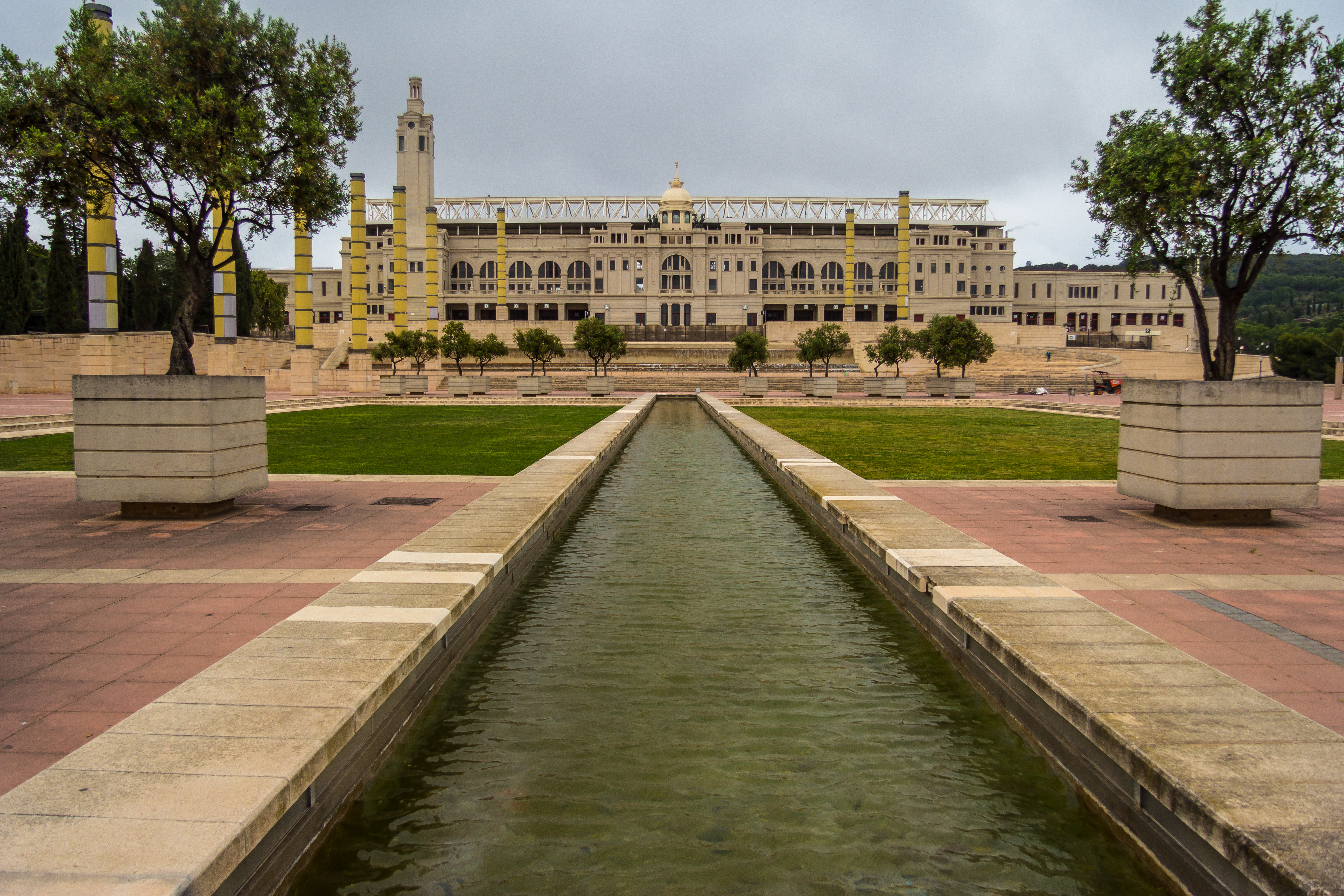 Montjuïc, Barcelona